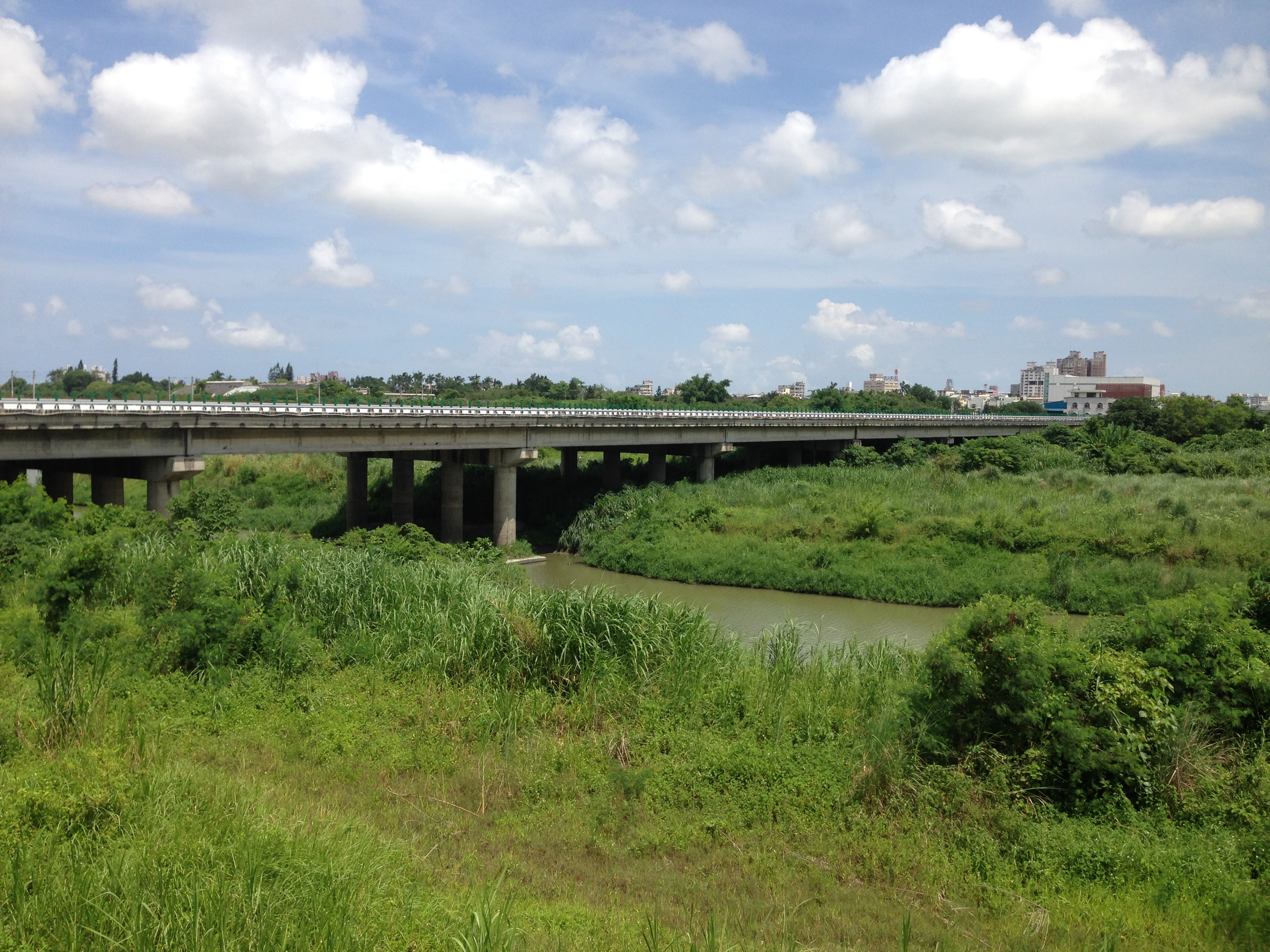 中文（台灣）: 急水溪大橋